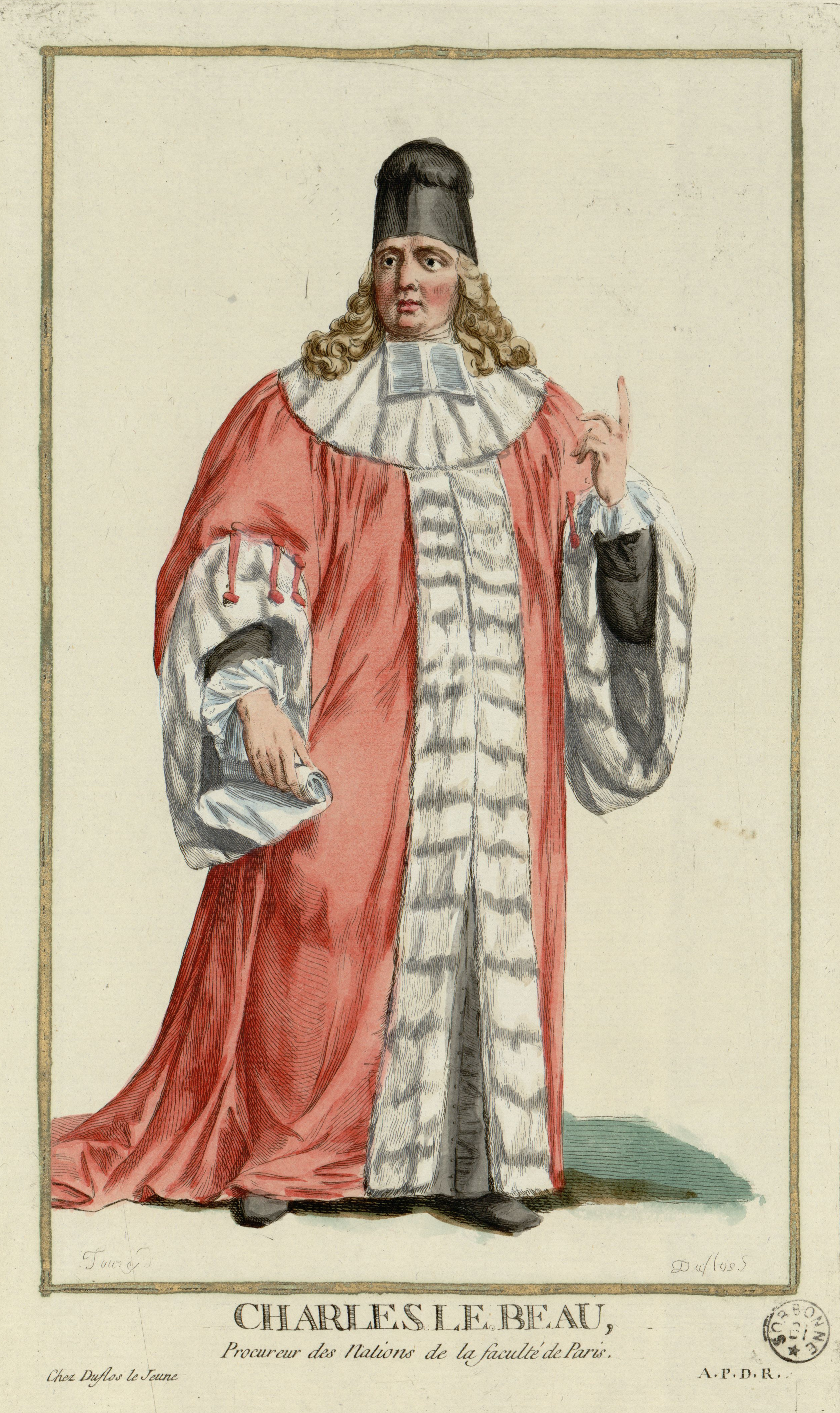 Charles Le Beau (1701-1778). Estampe